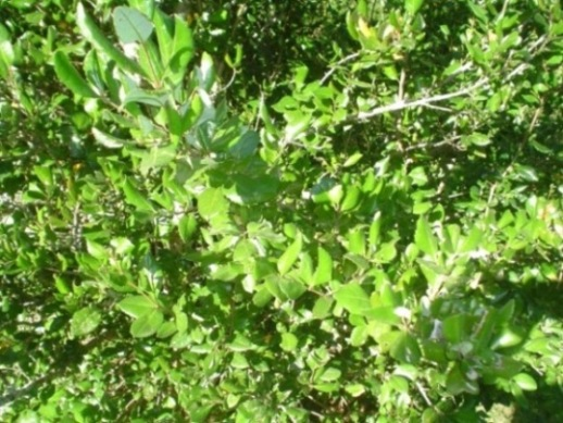 Follaje de avellanillo o guardafuego (Lomatia dentata). Isla Teja, Valdivia, Chile)